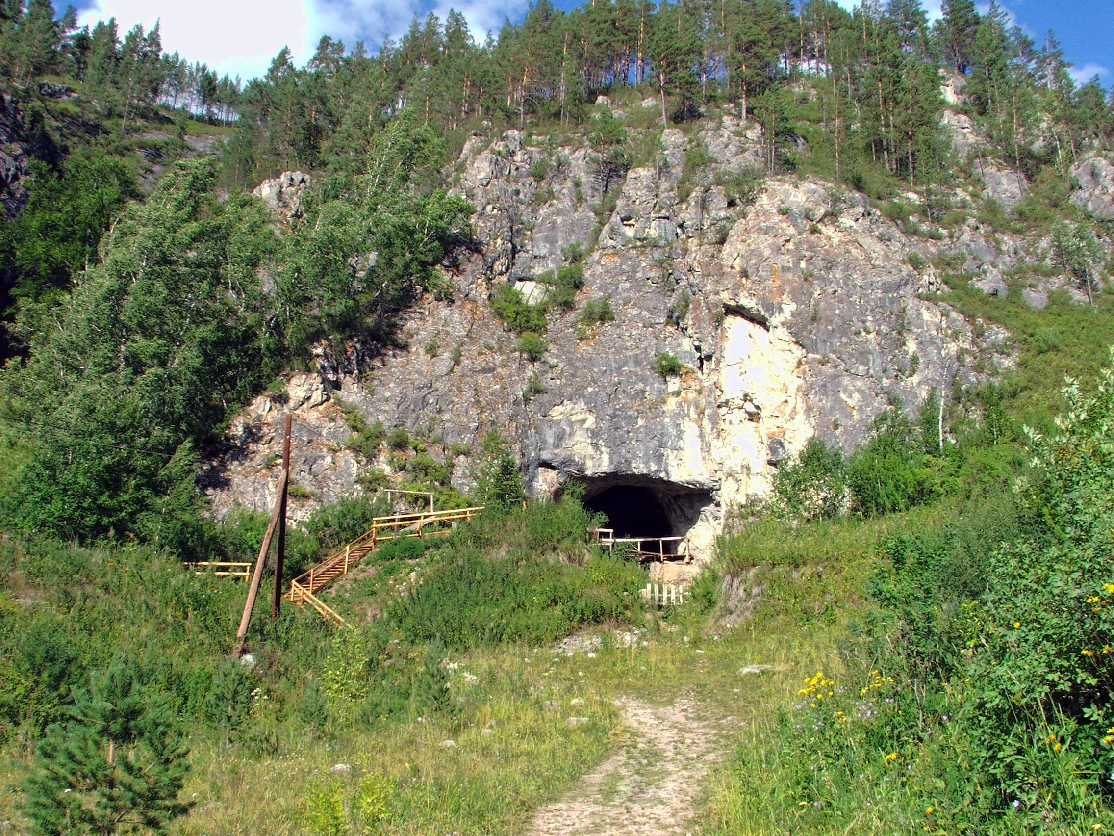 Денисова пещера: Солонешенский район, Алтайский край